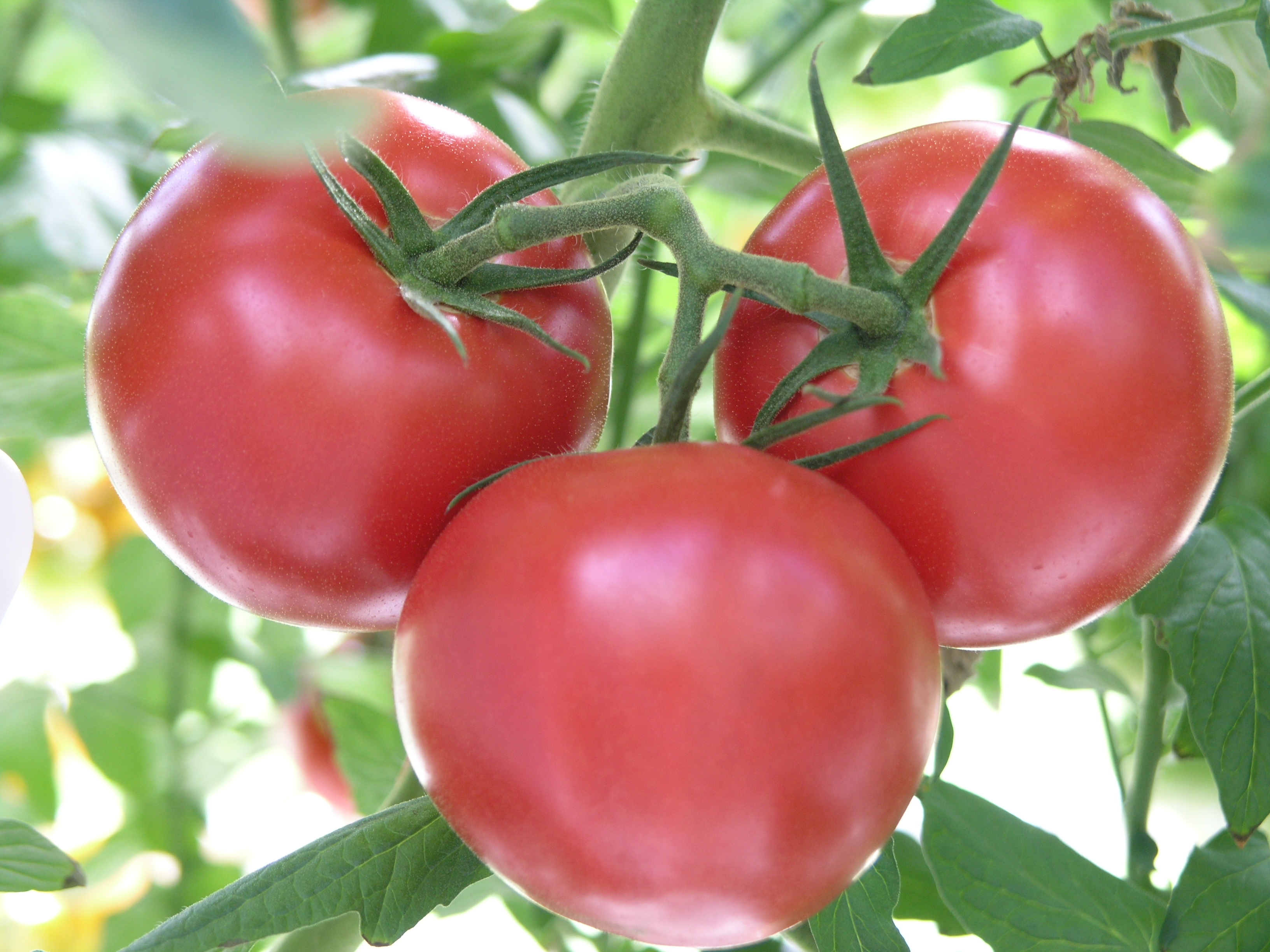 Tomate Frucht rosa Sorte